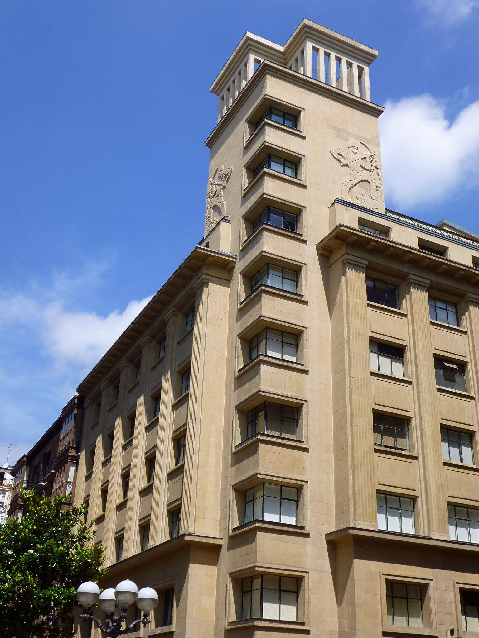 Edificio en la confluencia de las calles Diputación y Arbieto de Bilbao